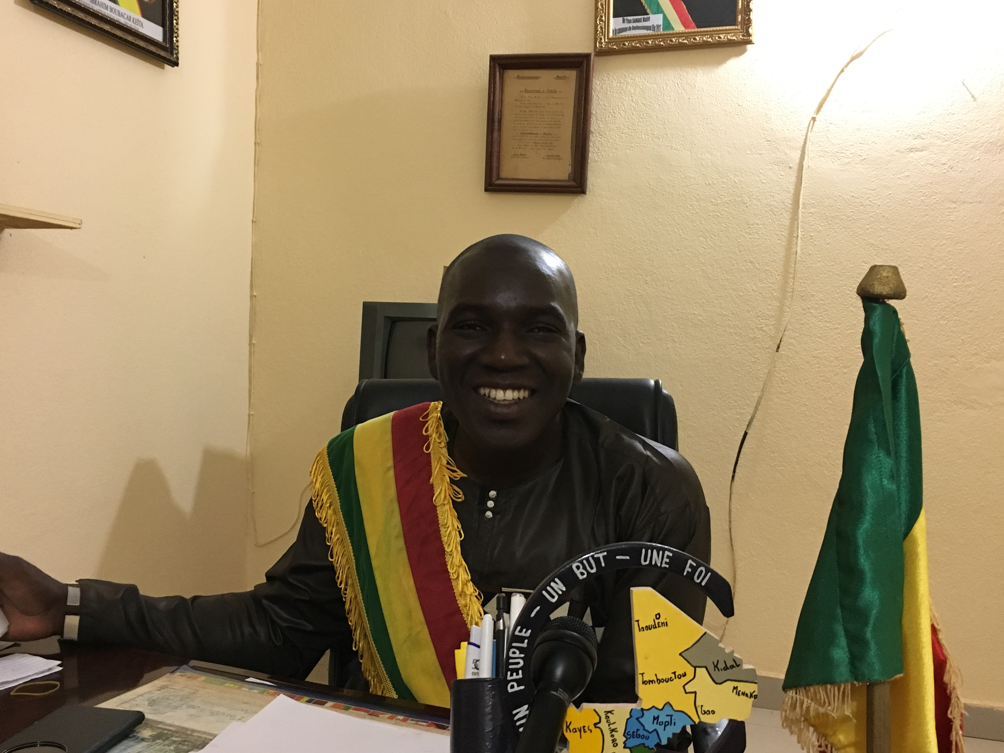 Le maire d'Ouelessebougou, Yaya Samaké, au Mali, le 3 décembre 2017. (VOA/Kassim Traoré)